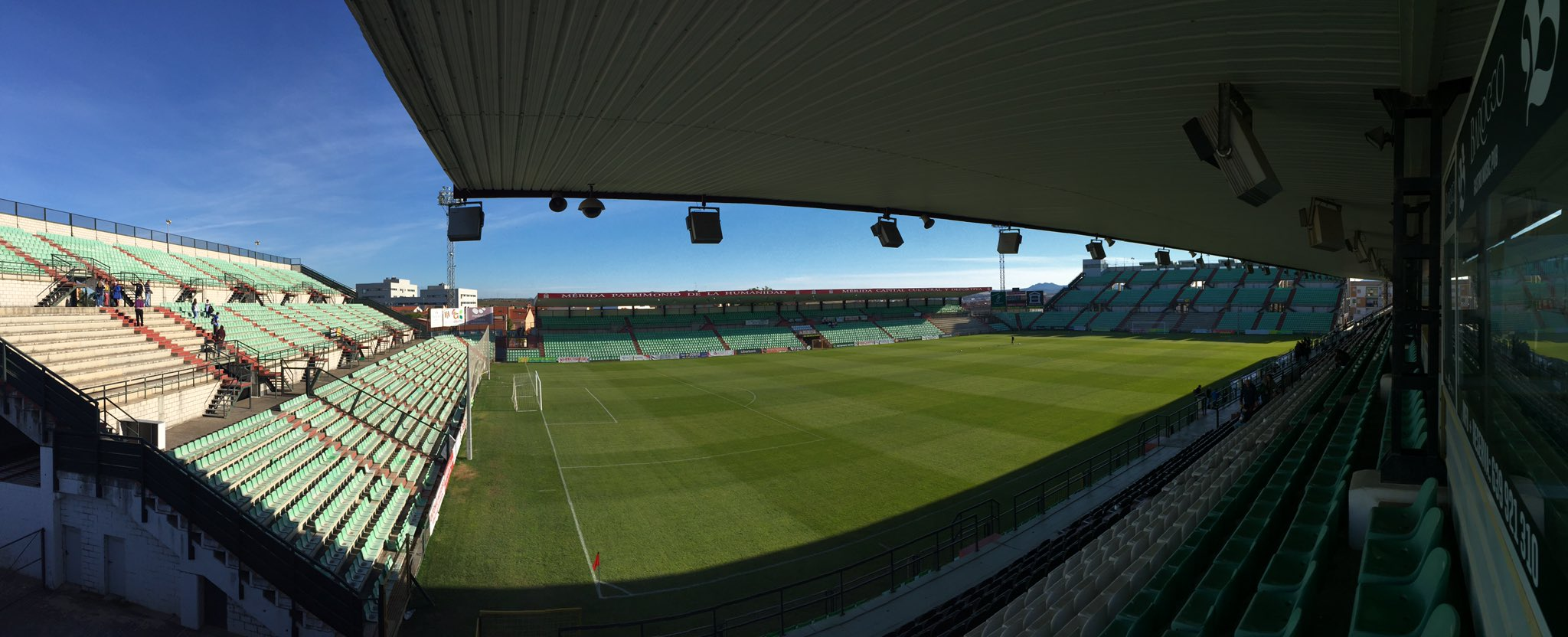 Interior del Estadio Romano de Mérida (España) desde tribuna lateral norte.